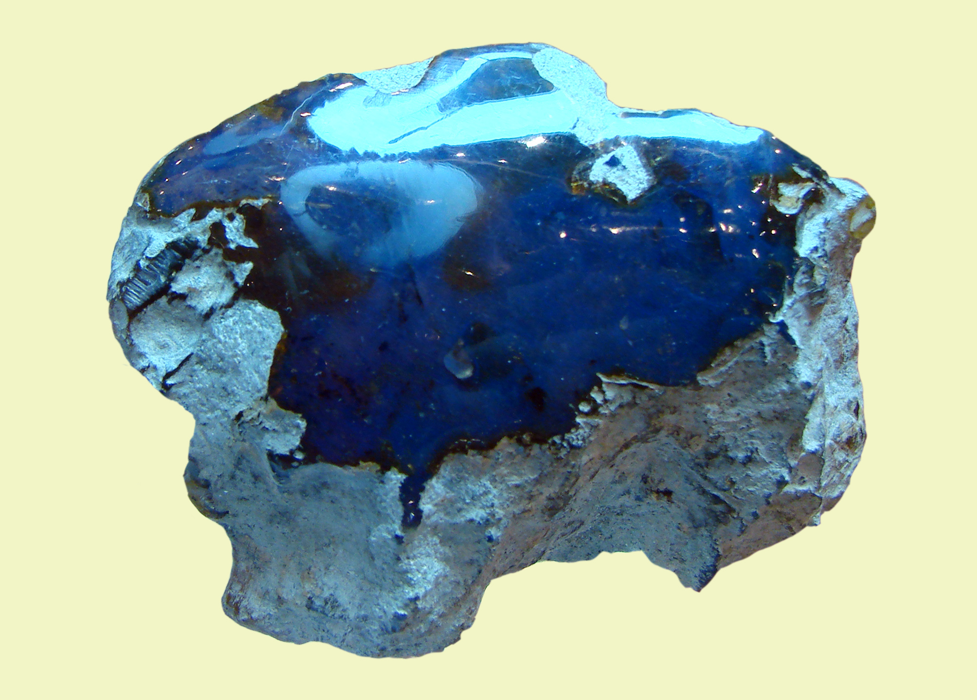 Ambre dominicain, couleur bleue naturelle, 25 à 40 millions d'années.